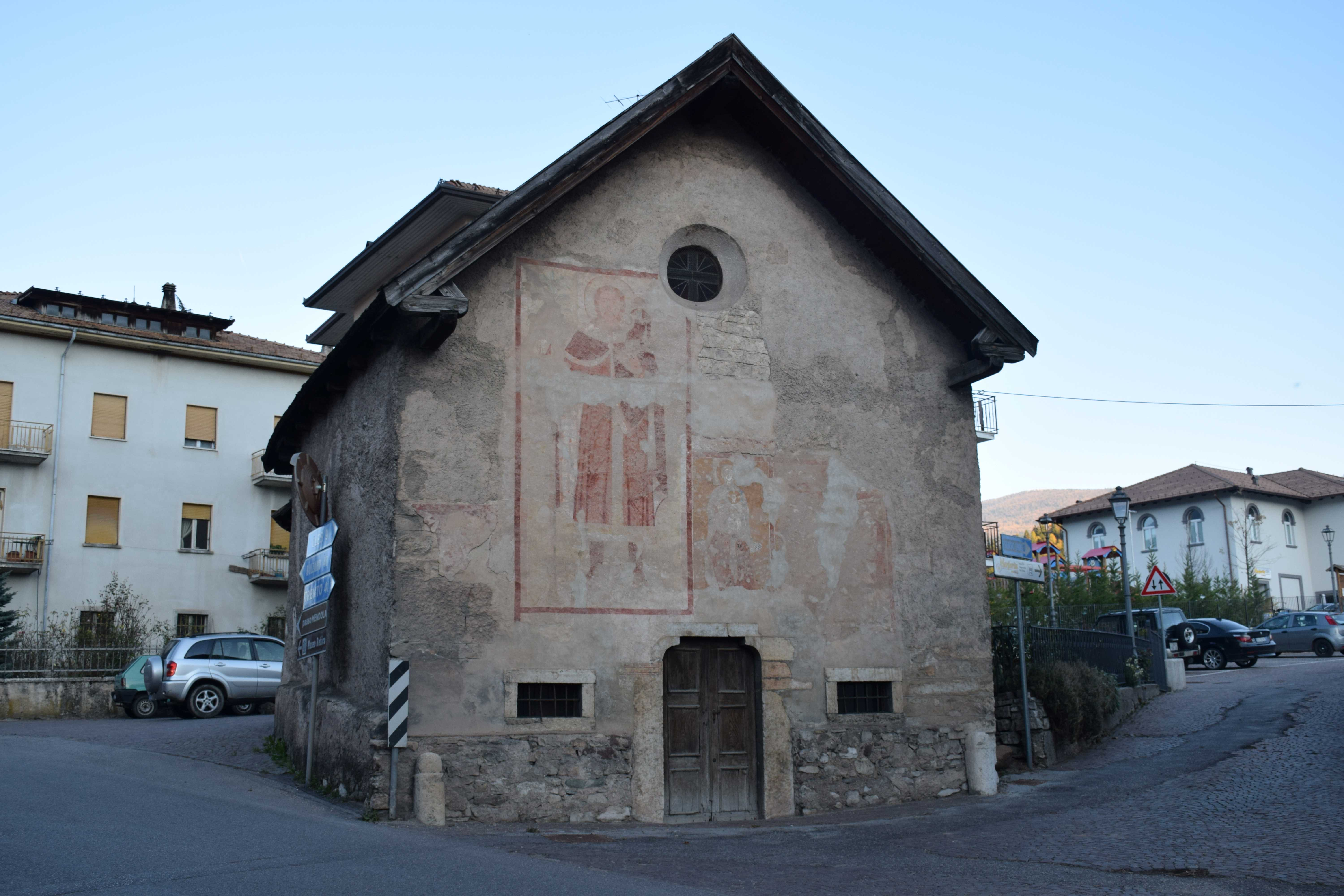 Facciata della piccola Chiesa di Sant'Alessandro, dove è visibile l'affresco di San Cristoforo